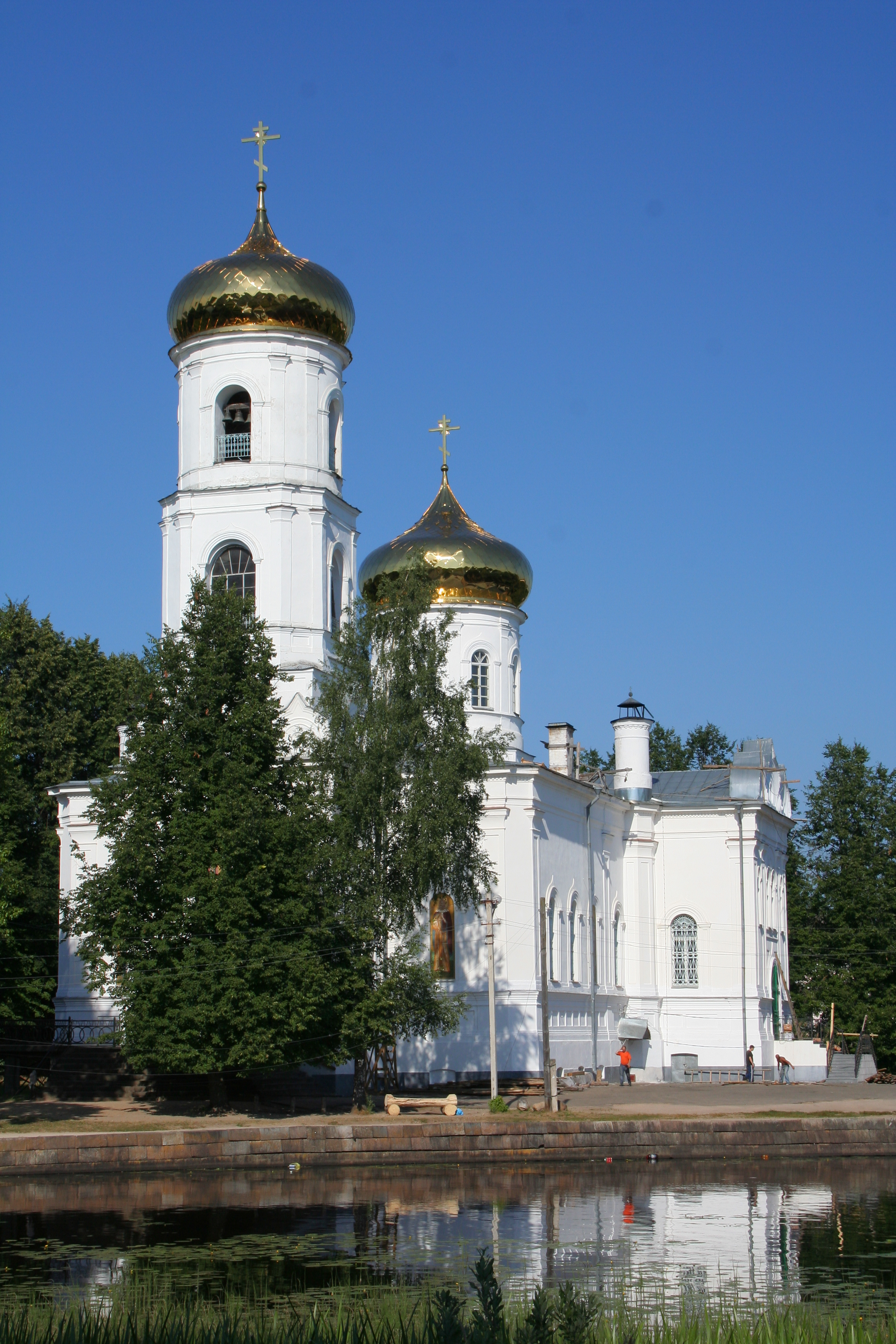 Ansichten der Stadt Wyschni Wolotschok (Oblast Twer, Russland). Epiphanien-Kathedrale.